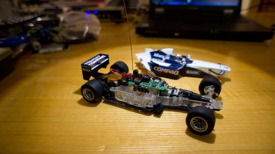 Шасси радиоуправляемой автомодели Kyosho Mini-Z серии Formula